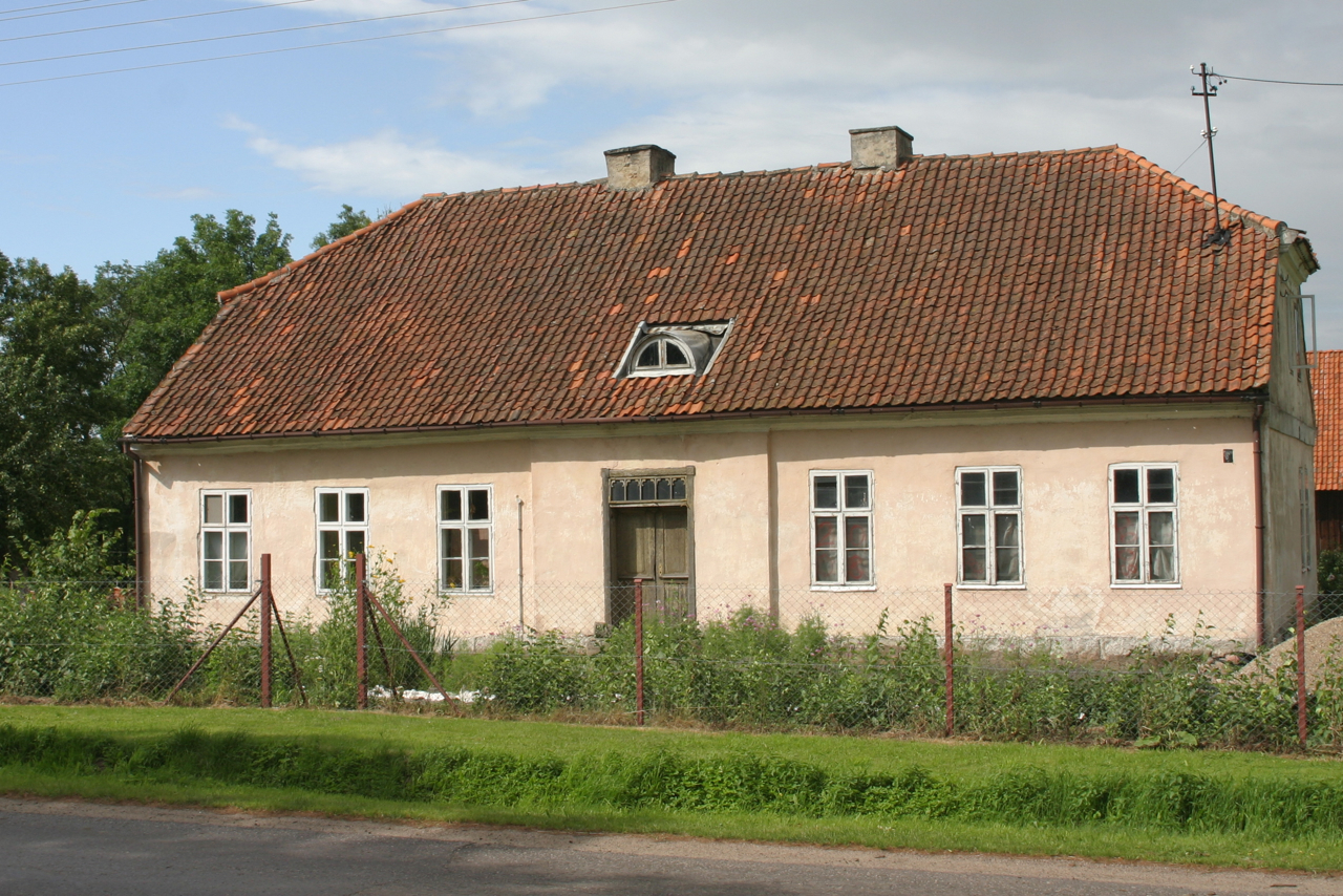 Parys